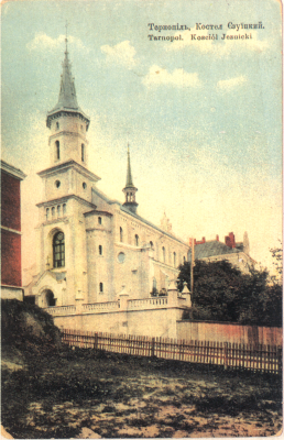 1=Єзуїтський костел у Тернополі. Вигляд з вулиці Петра Скарги. Збудований у 1898—1901 роках за проектом Діонісія Кшичковського (1861—1943).